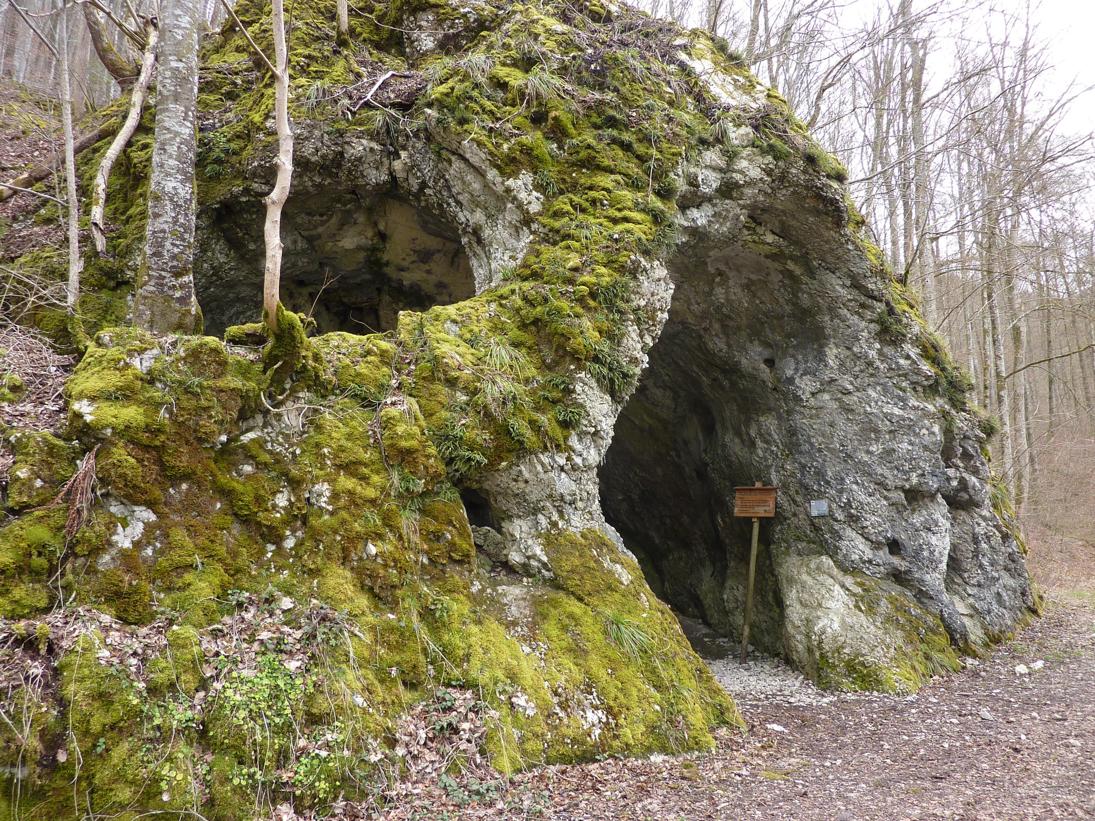 Roter-Brunnen-Höhle, Leibertingen, Landkreis Sigmaringen ND 072008; Geotop Nr. ND8437002